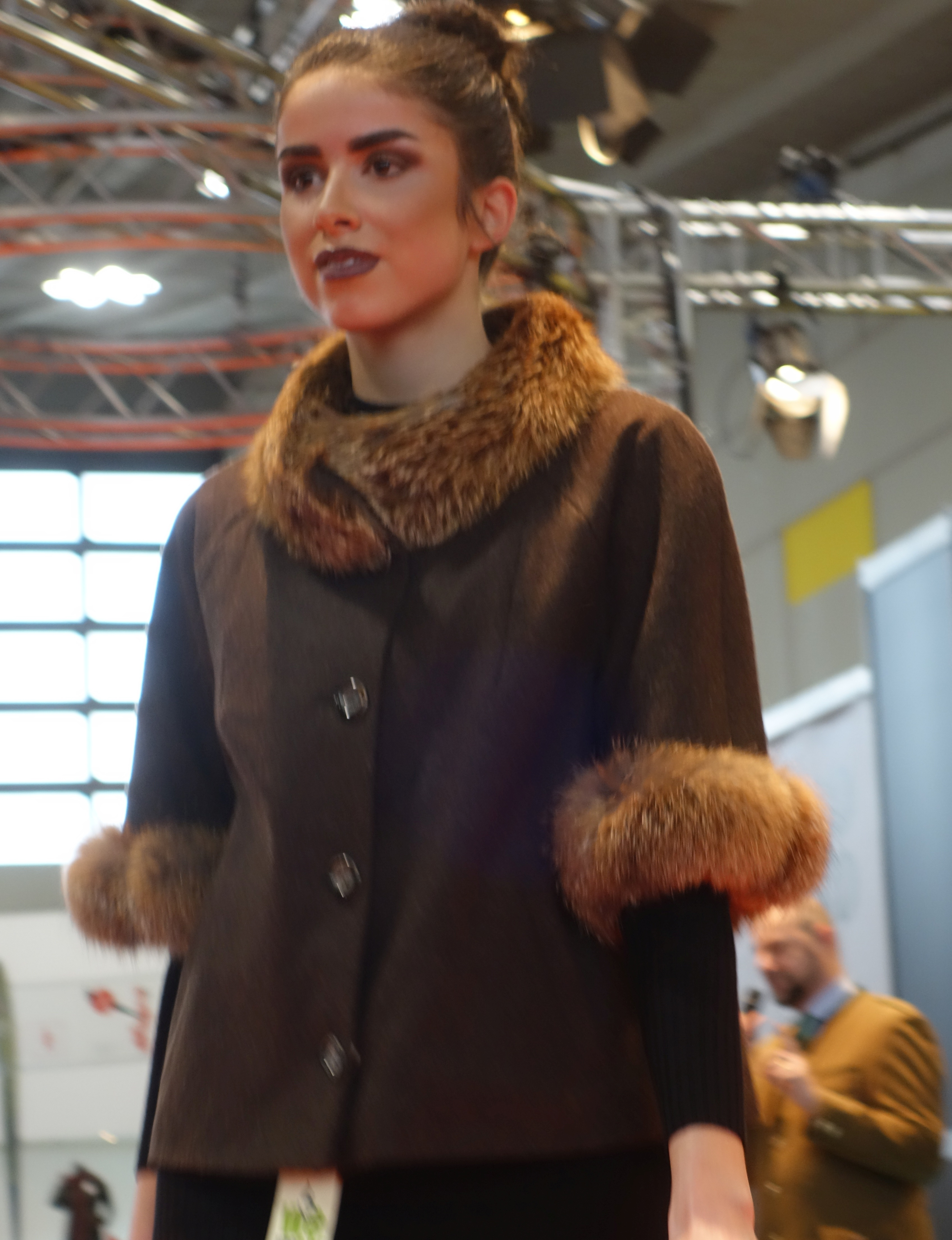 International German Red Fox Award 2018, Jagd & Hund 2018, Dortmund Westfalenhallen. Lodenjäckchen mit Rotfuchskragen (Ries Mode in Leder & Pelz).